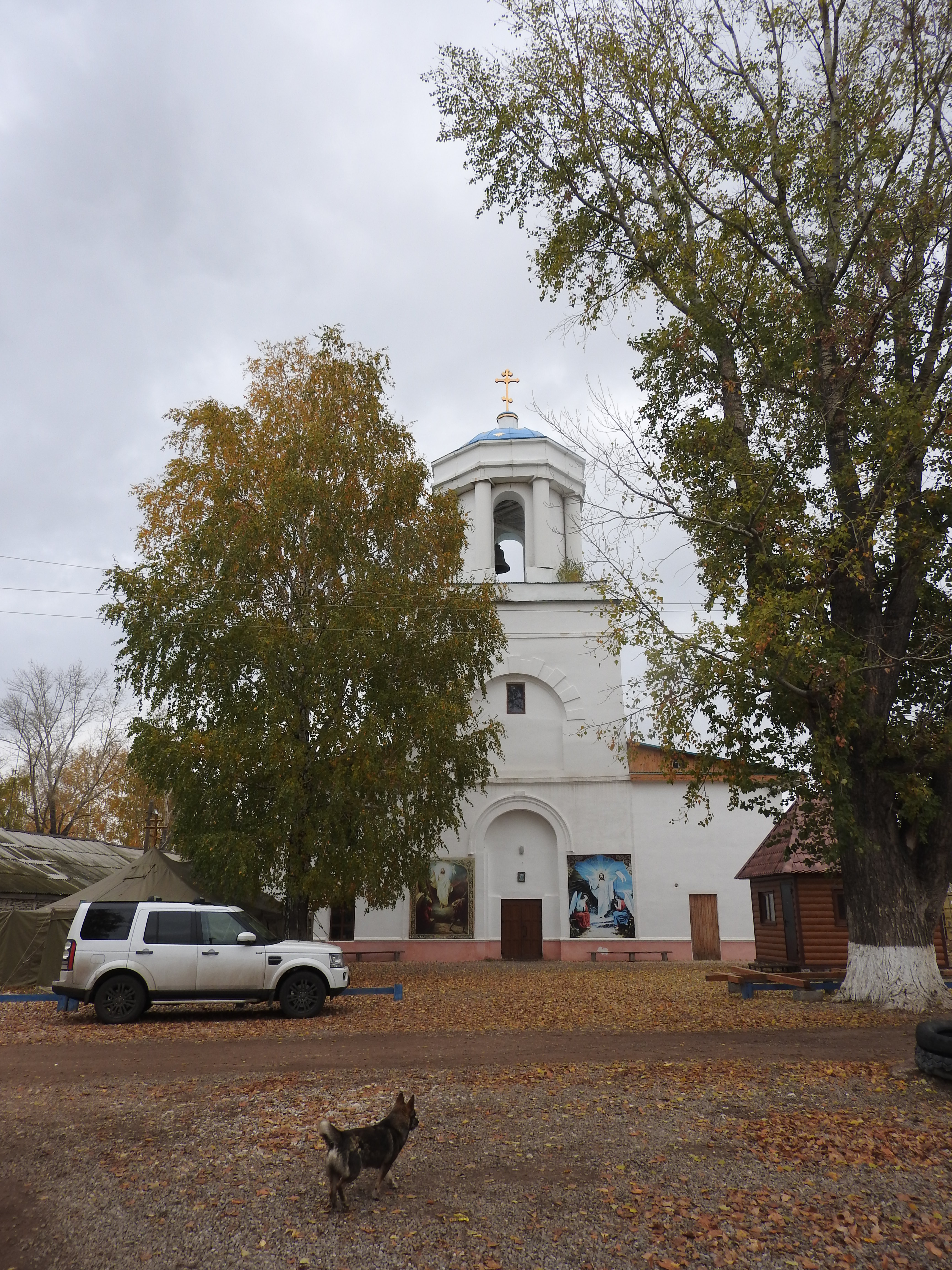 Башҡортса: Ғафури районы Табын ауылында сиркәү